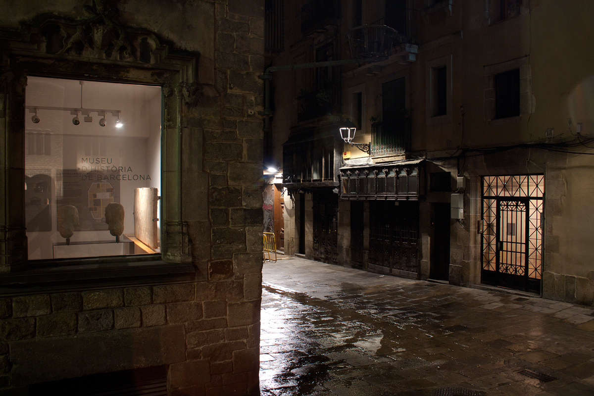 Dzielnica Gotycka